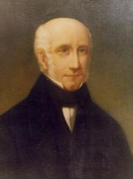 Portrait contemporain de Léon Papin Dupont